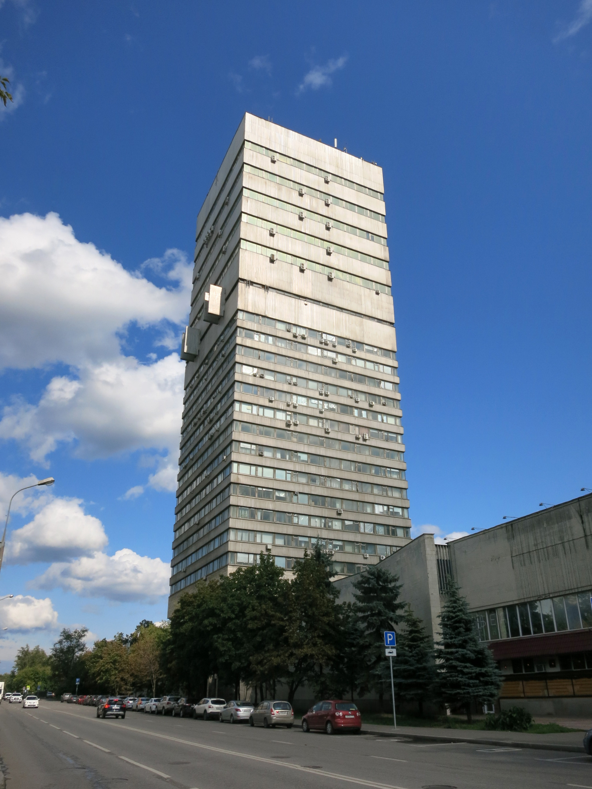 Главный межрегиональный центр обработки и распространения статистической информации Росстата (ГМЦ Росстата). Бывший Главный вычислительный центр Центрального статистического управления СССР. Здание возведено в 1968–1980 гг. Архитекторы: Леонид Николаевич Павлов, Александр Всеволодович Лунёв, А. П. Семёнов, П. Э. Этлина. Конструкторы: Е. Б. Гармсен, Г. Г. Лысенко, В. А. Соболев. Высота здания — 110 м. 55°46′45.6″N 37°44′00.5″E 55.7793305, 37.7334774